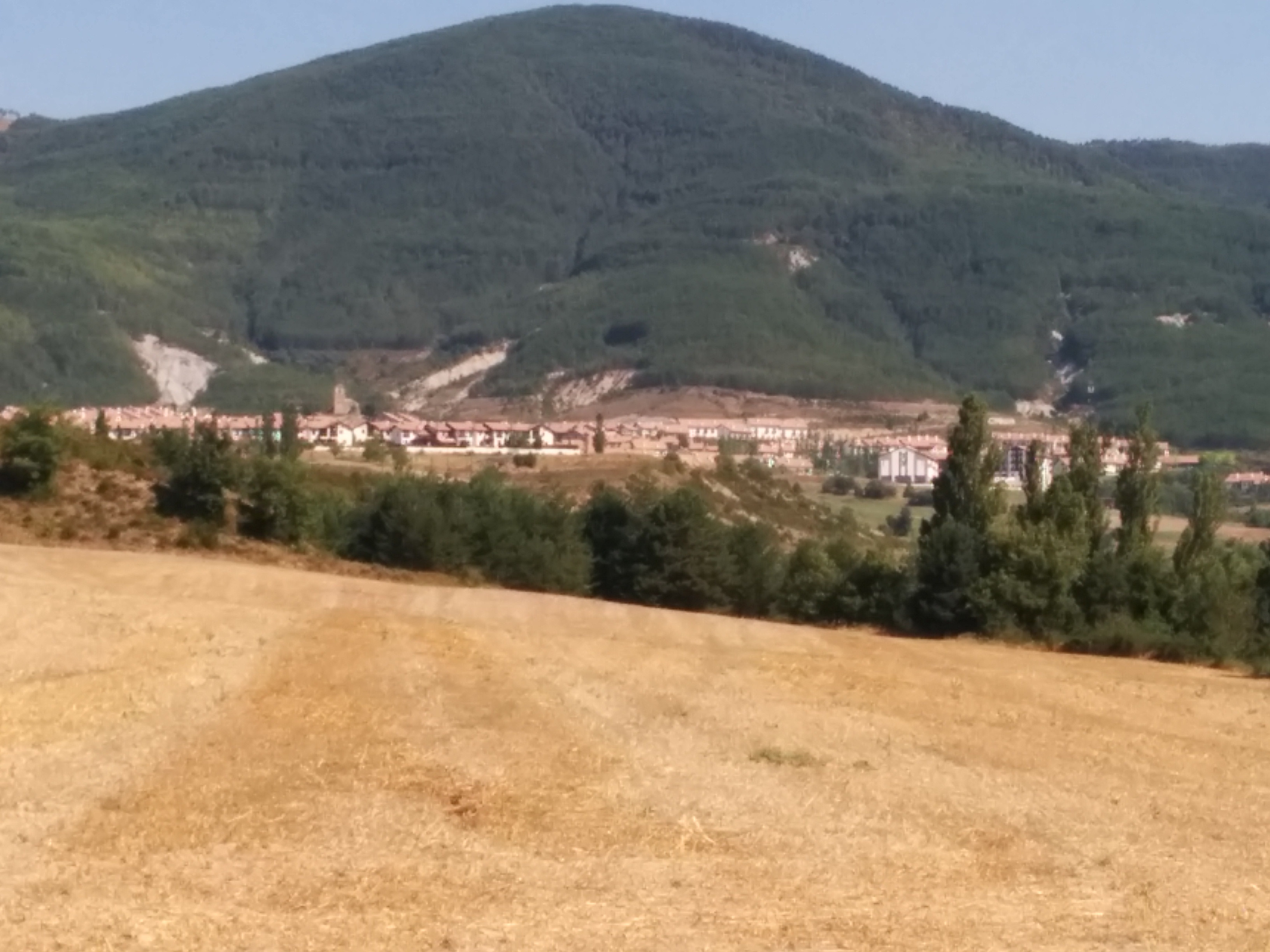 urbanización Las Lomas de Badaguas, jaca